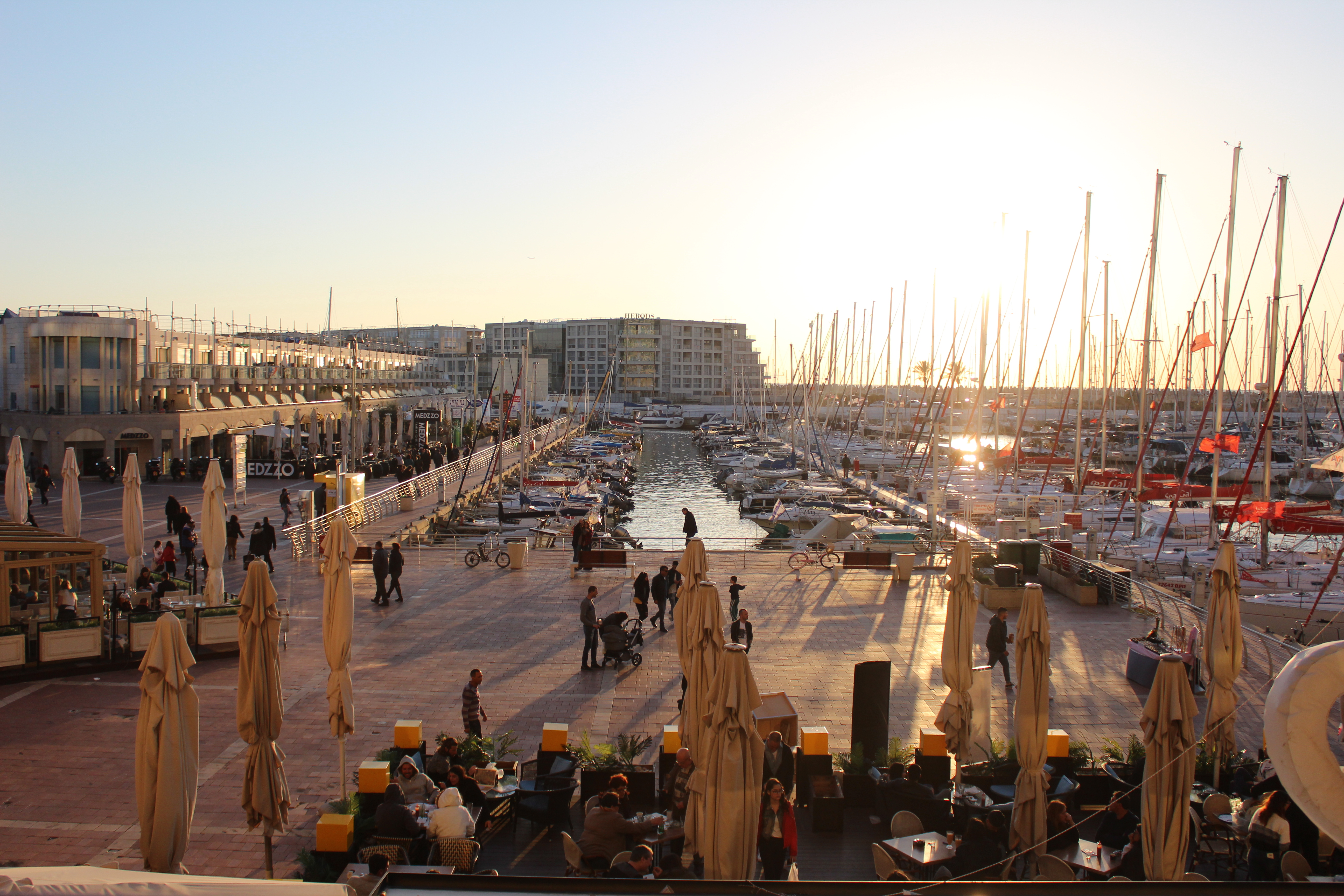 מרינה ארנה ישראל